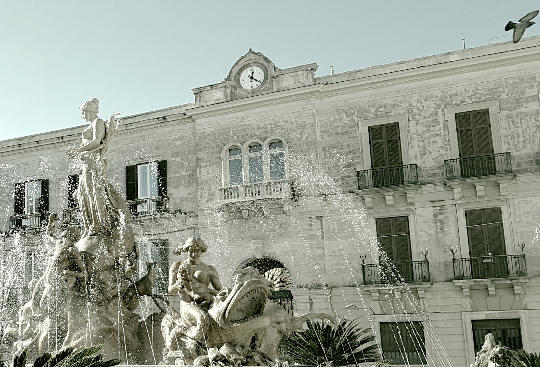 Pallazzo dell'orologio e fontana di Diana, Piazza Archimede